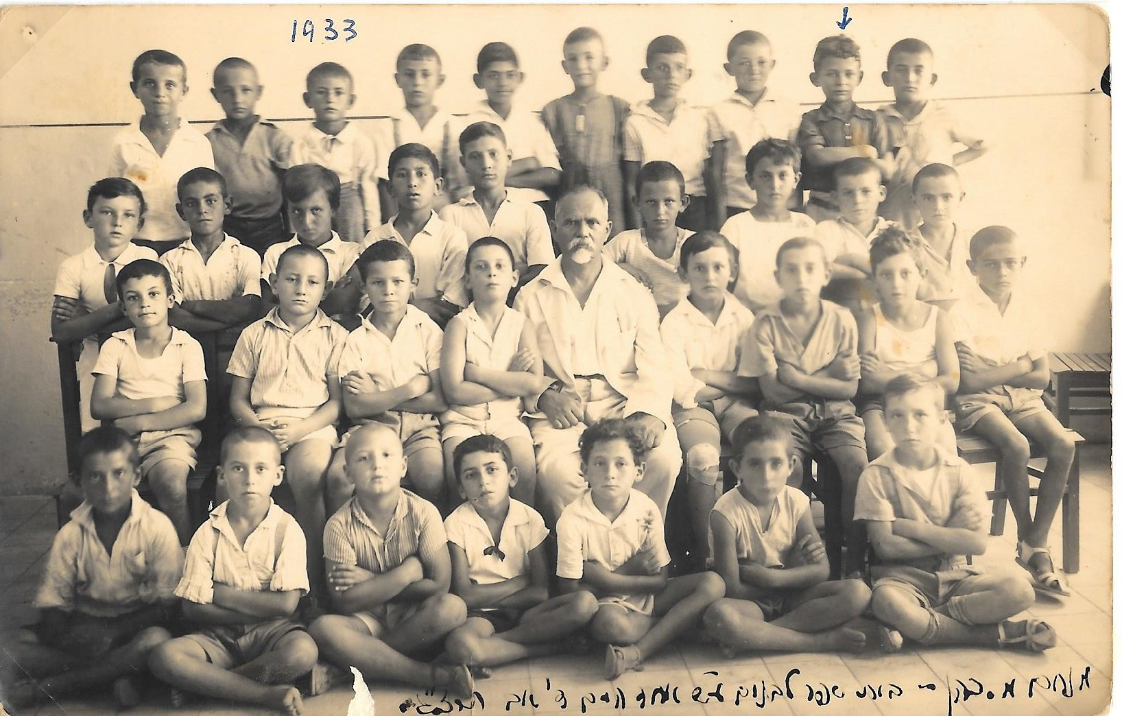 מנחם כהן בבית הספר לבנים על שם אחד העם בתל אביב